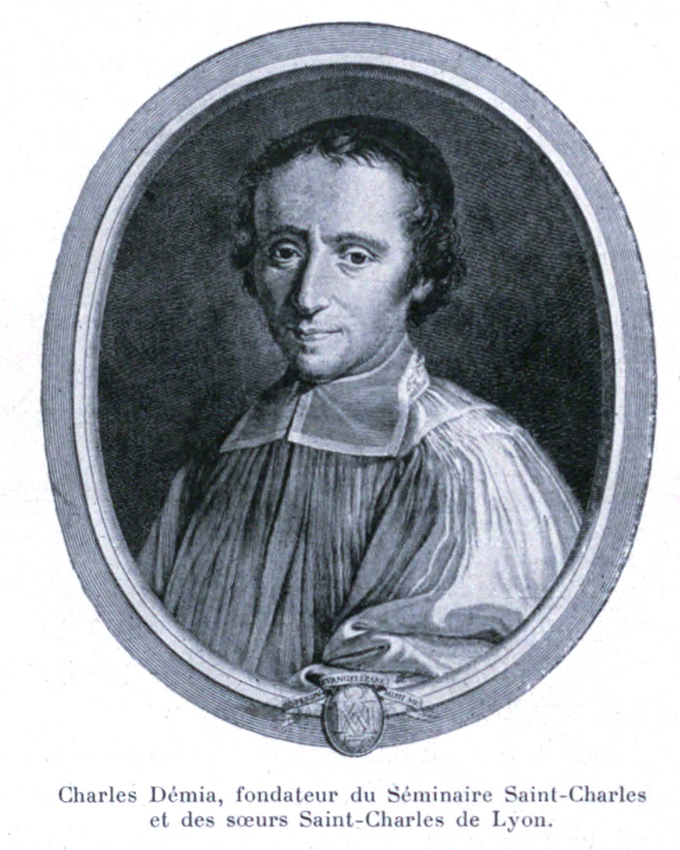 Illustration pour l'Histoire des églises et chapelles de Lyon